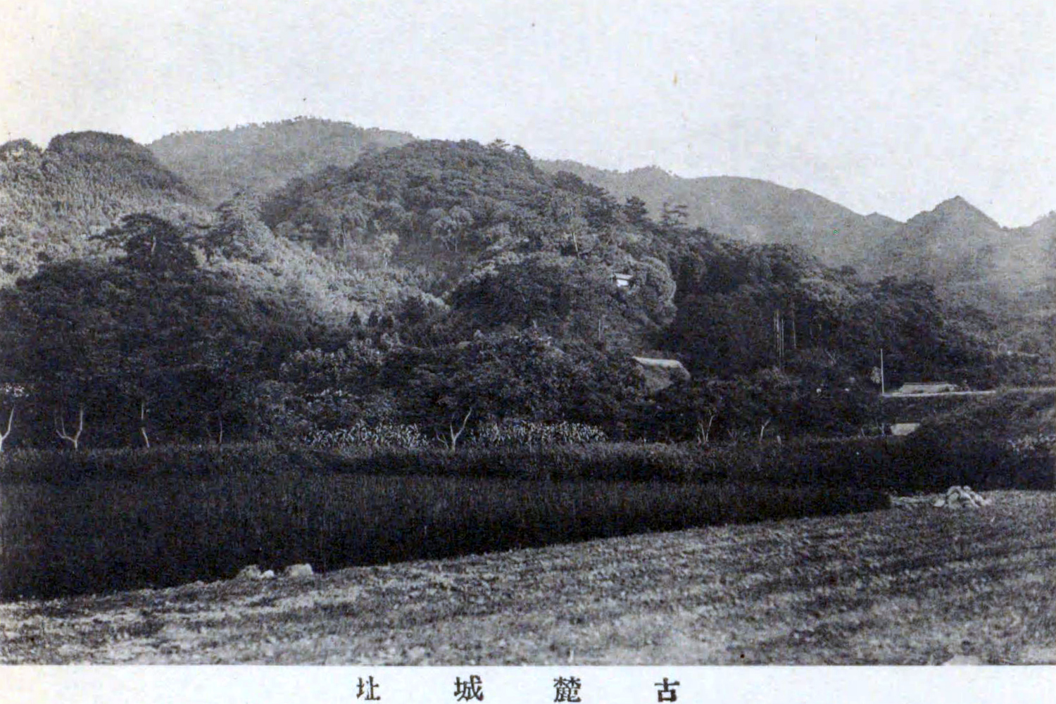 古麓城 （熊本県八代市古麓町）